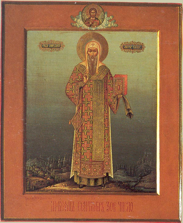 Святитель Михаил митрополит Киевский. Икона месячной минеи. (Государственный Эрмитаж)